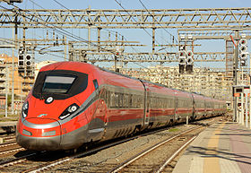 Frecciarossa 1000. Italienska tåg (400km/h)